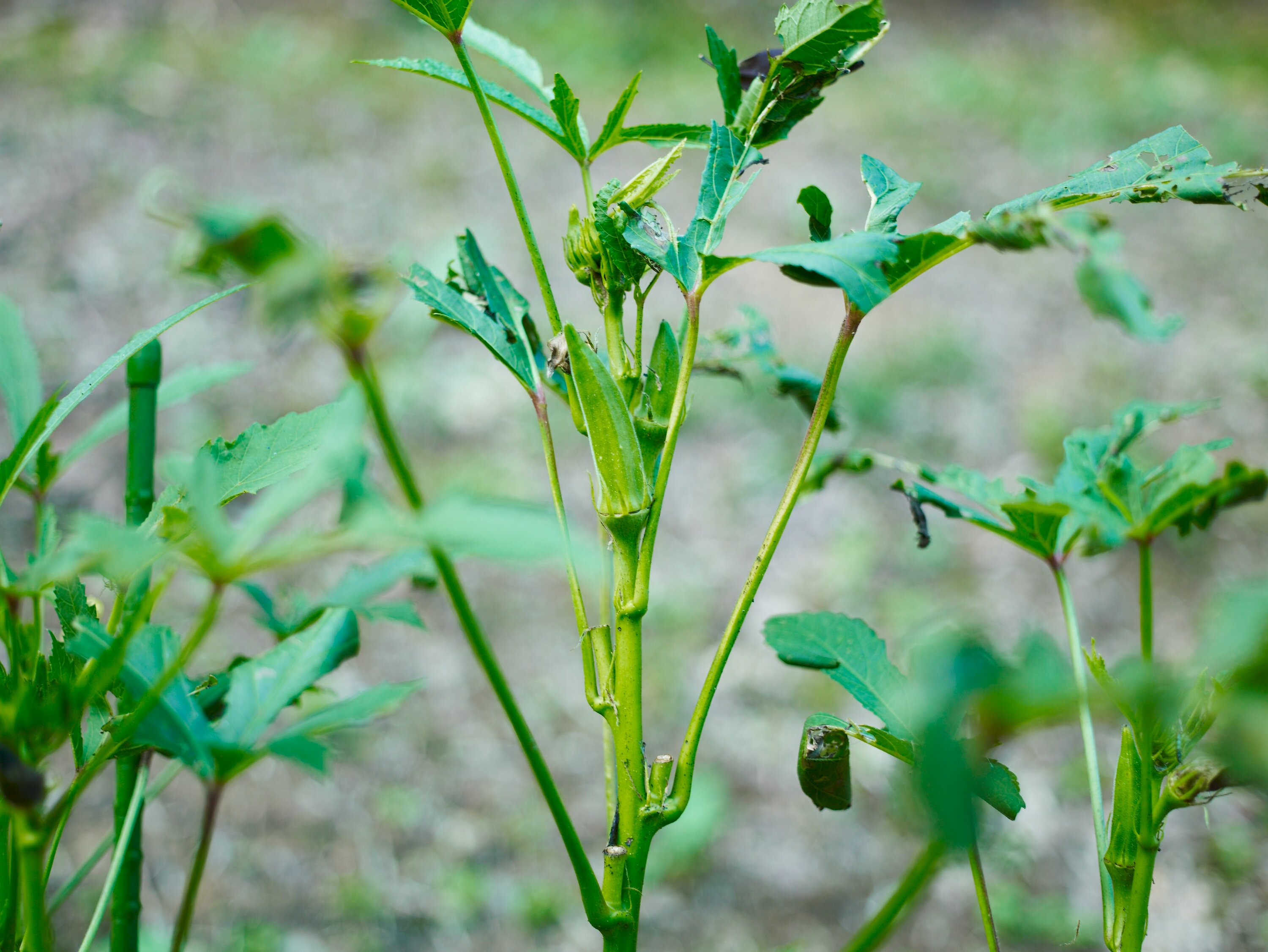 Okra